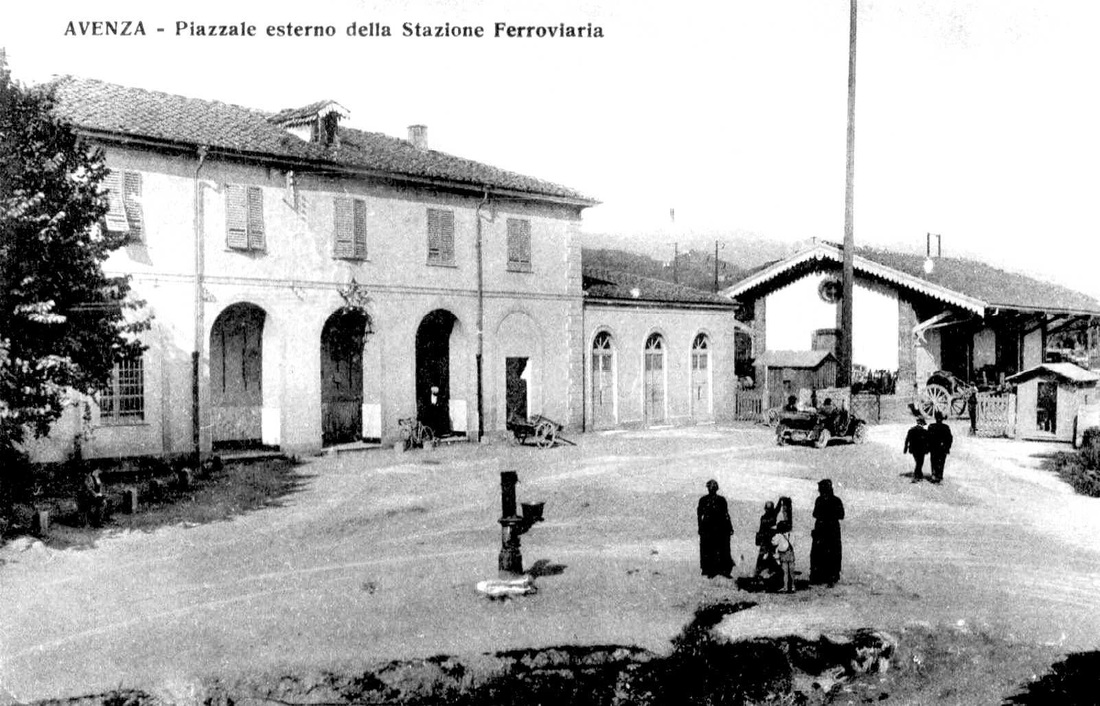 Cartolina storica della stazione di Carrara-Avenza, qui ripresa nel 1930.Descrizione originale da Cartoline di Carrara (1900-1950): La stazione ferroviaria - 1930. La ferrovia arrivò ad Avenza nel 1862.